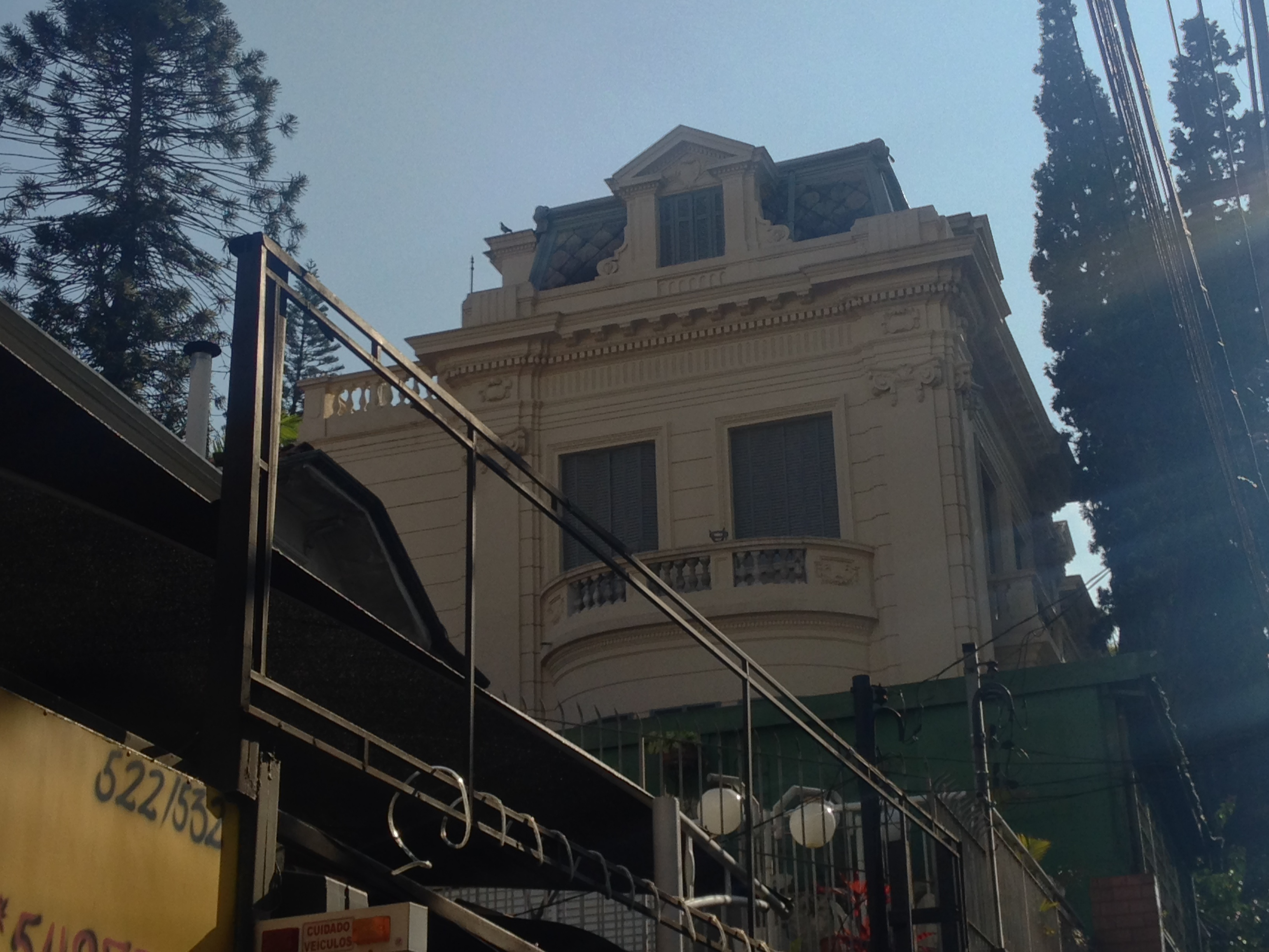 Vista traseira da Residência da Família Jafet, na Rua Bom Pastor, 825, em São Paulo (SP), Brasil.